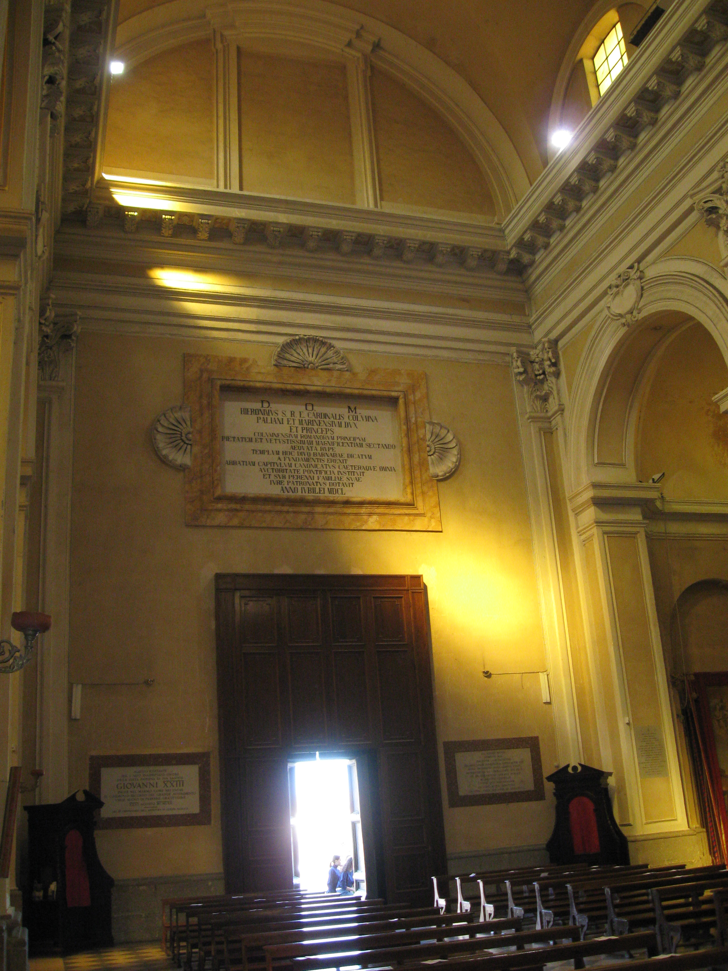 La controfacciata della Basilica di San Barnaba a Marino (RM)